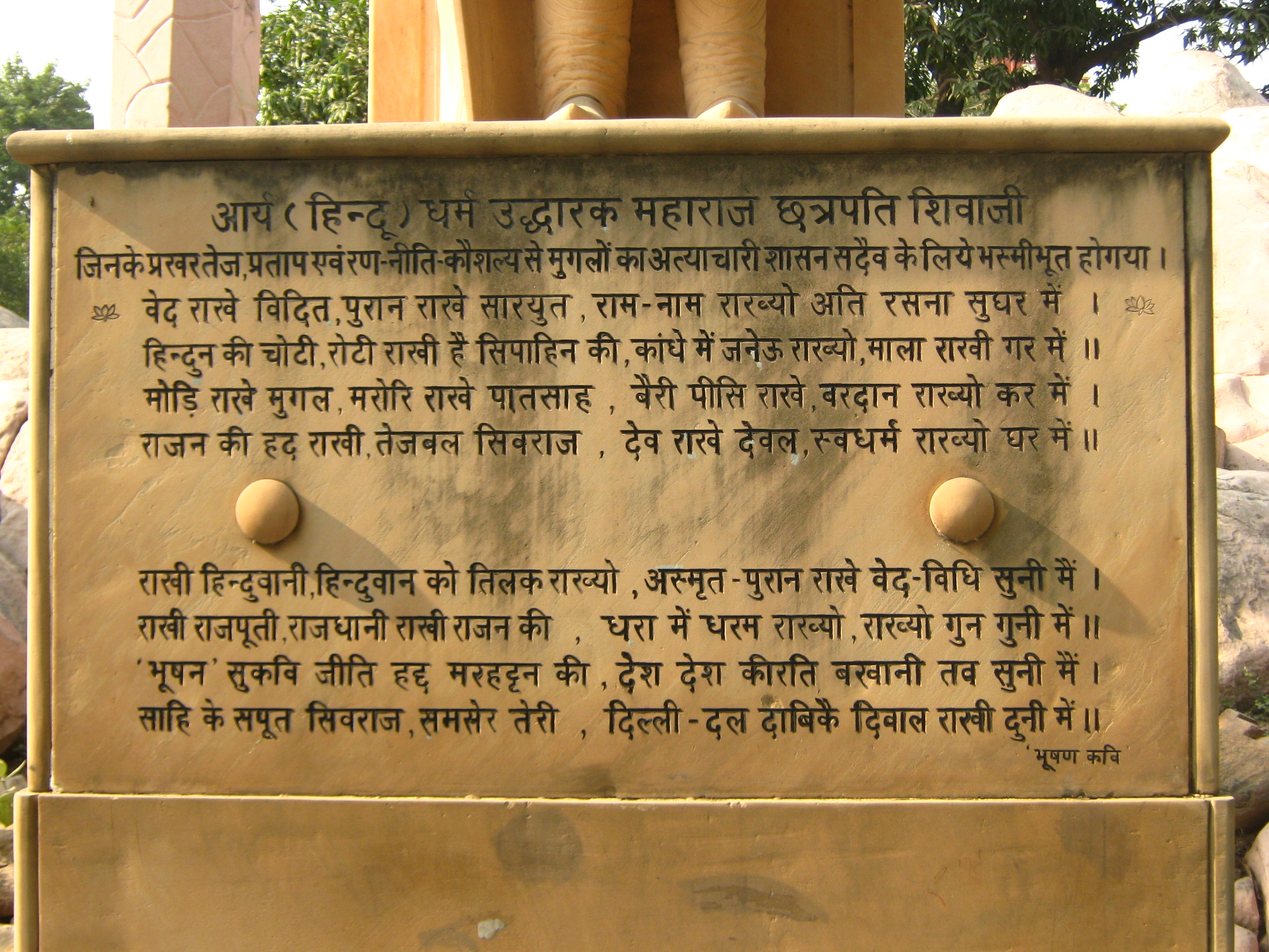 भूषण कवि द्वारा छत्रपति शिवाजी महाराज के बारे में रचे काव्य का बिरला मंदिर, दिल्ली में एक शिलालेख